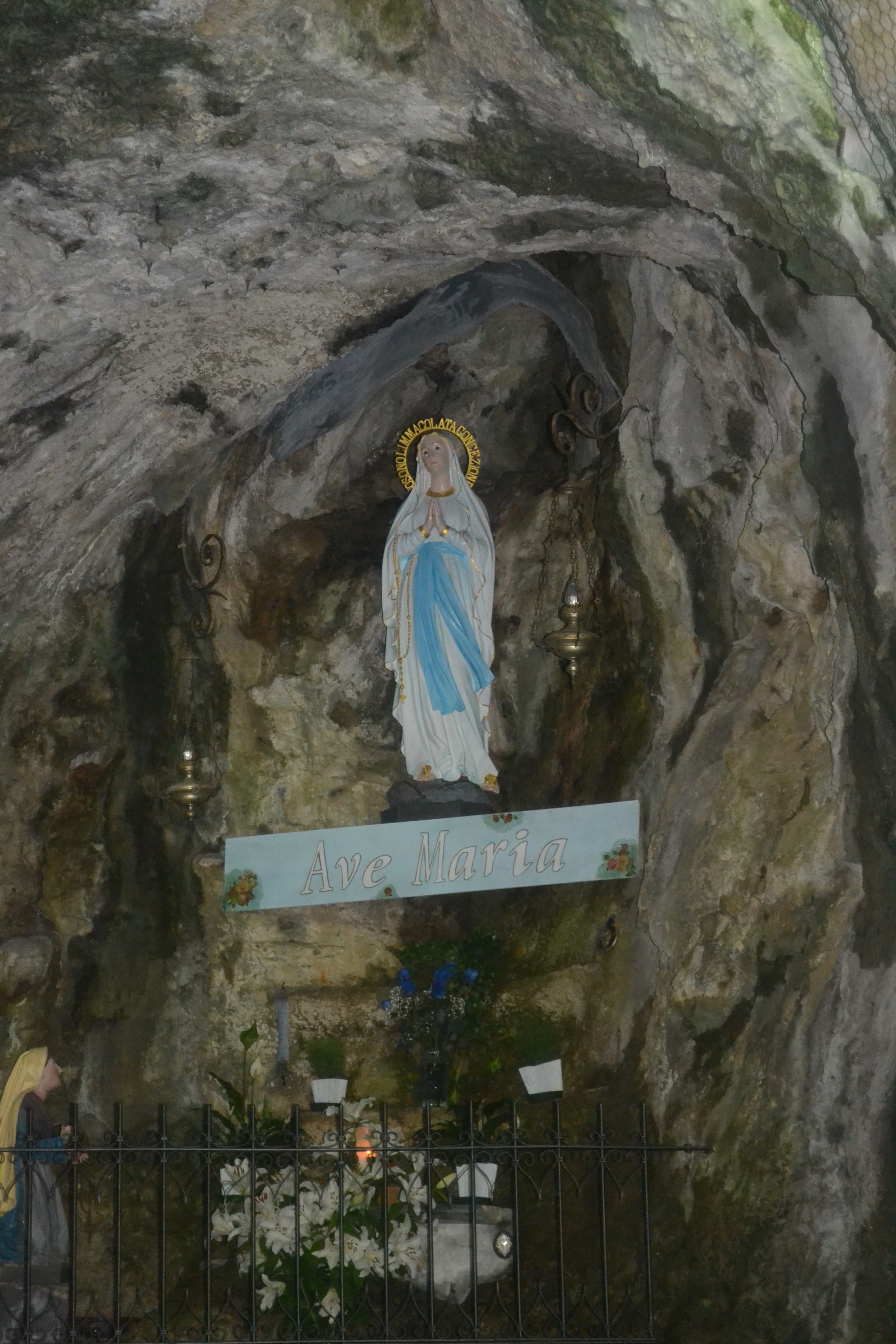 Santuario Santa Lucia Villanova Mondovì - Statua della Madonna restaurata